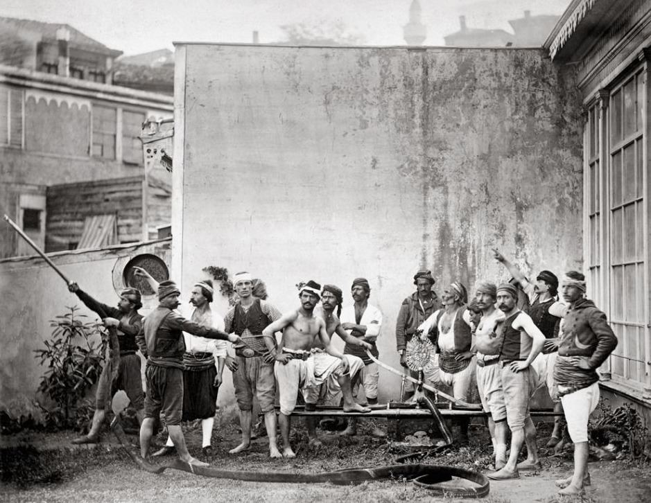 Gönüllü-Türk-Tulumbacılar-İtfaiyeciler-İstanbul-1870